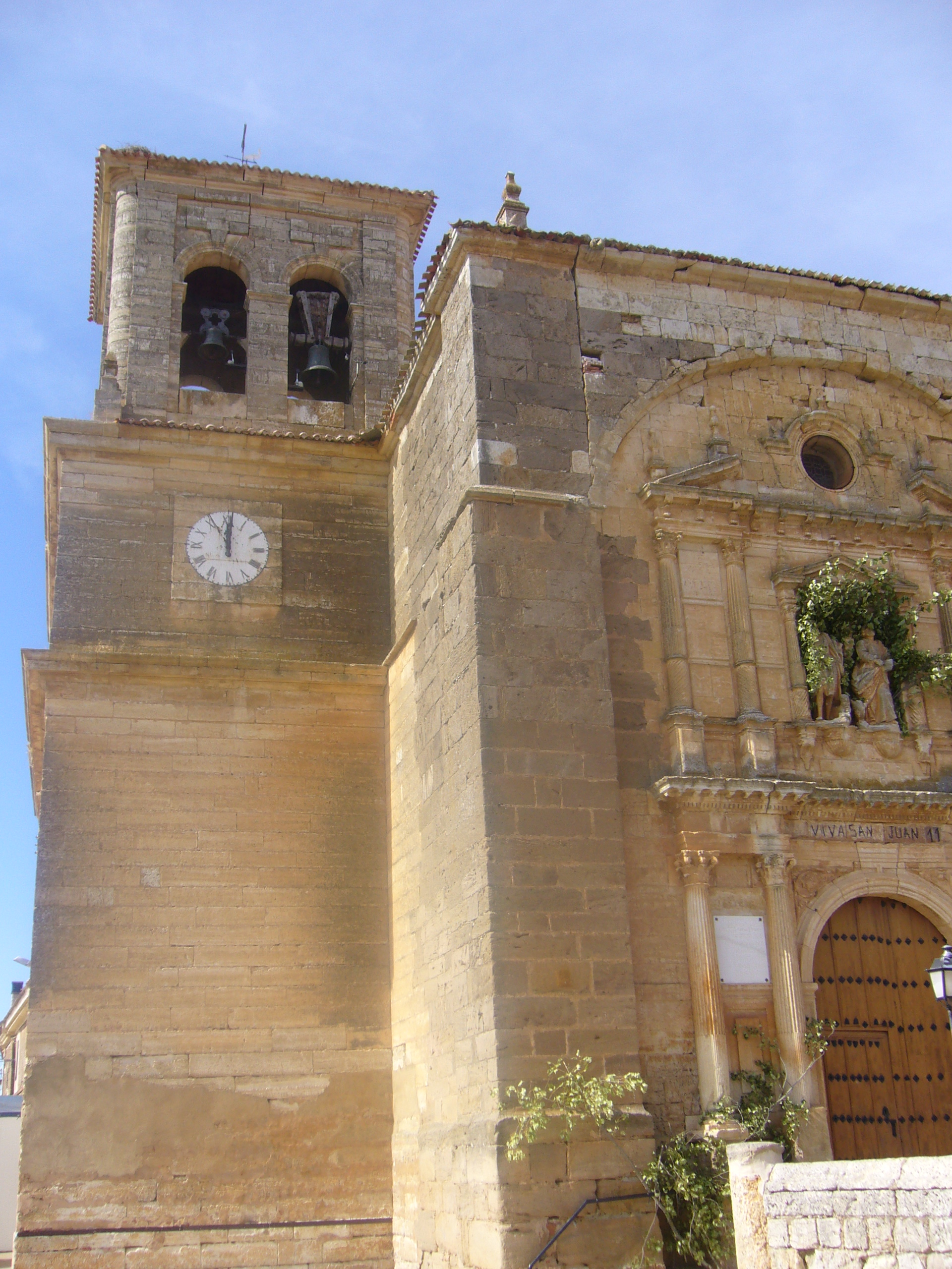 Iglesia Parroquial de los Santos Juanes, Padilla de Abajo, Burgos, Castilla y León, España